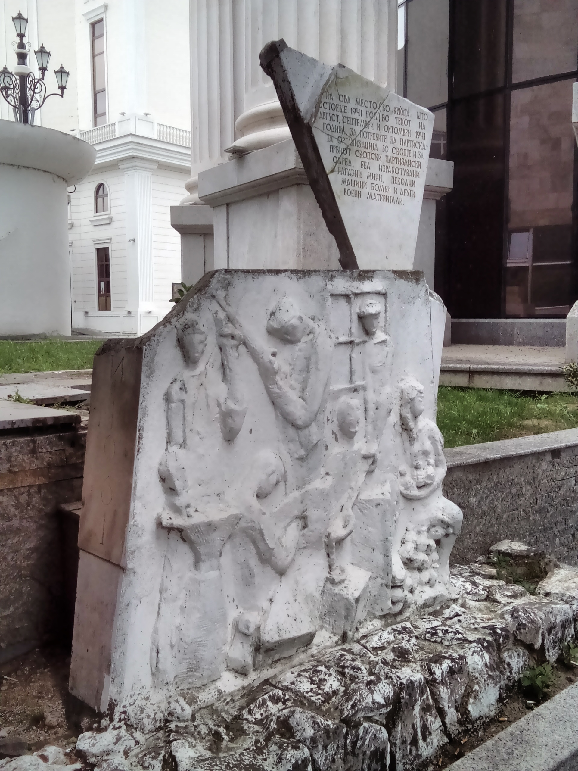 Centar, Skopje 1000, Macedonia (FYROM)